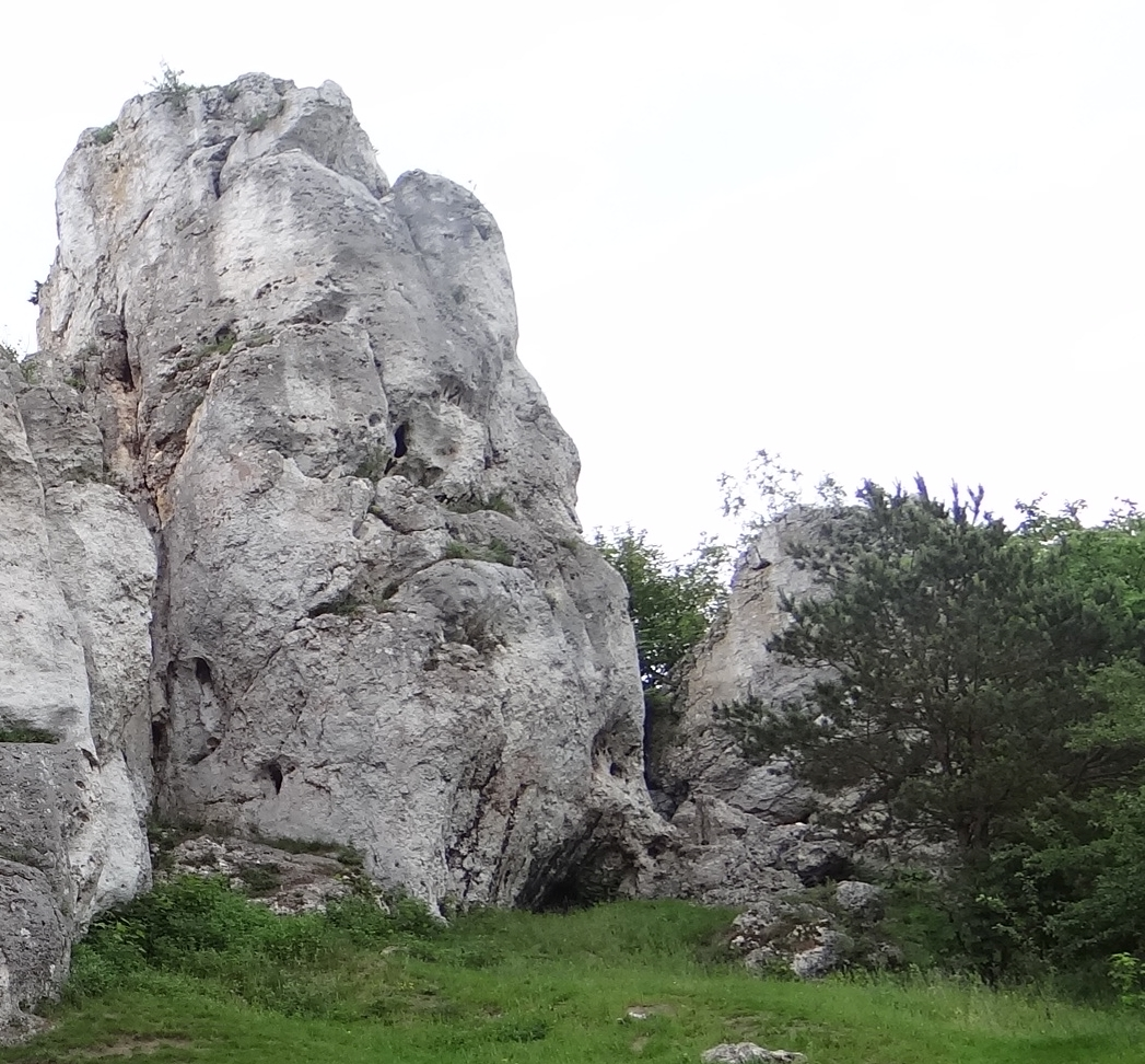 skała Locha w Grupie Knura w Łutowcu